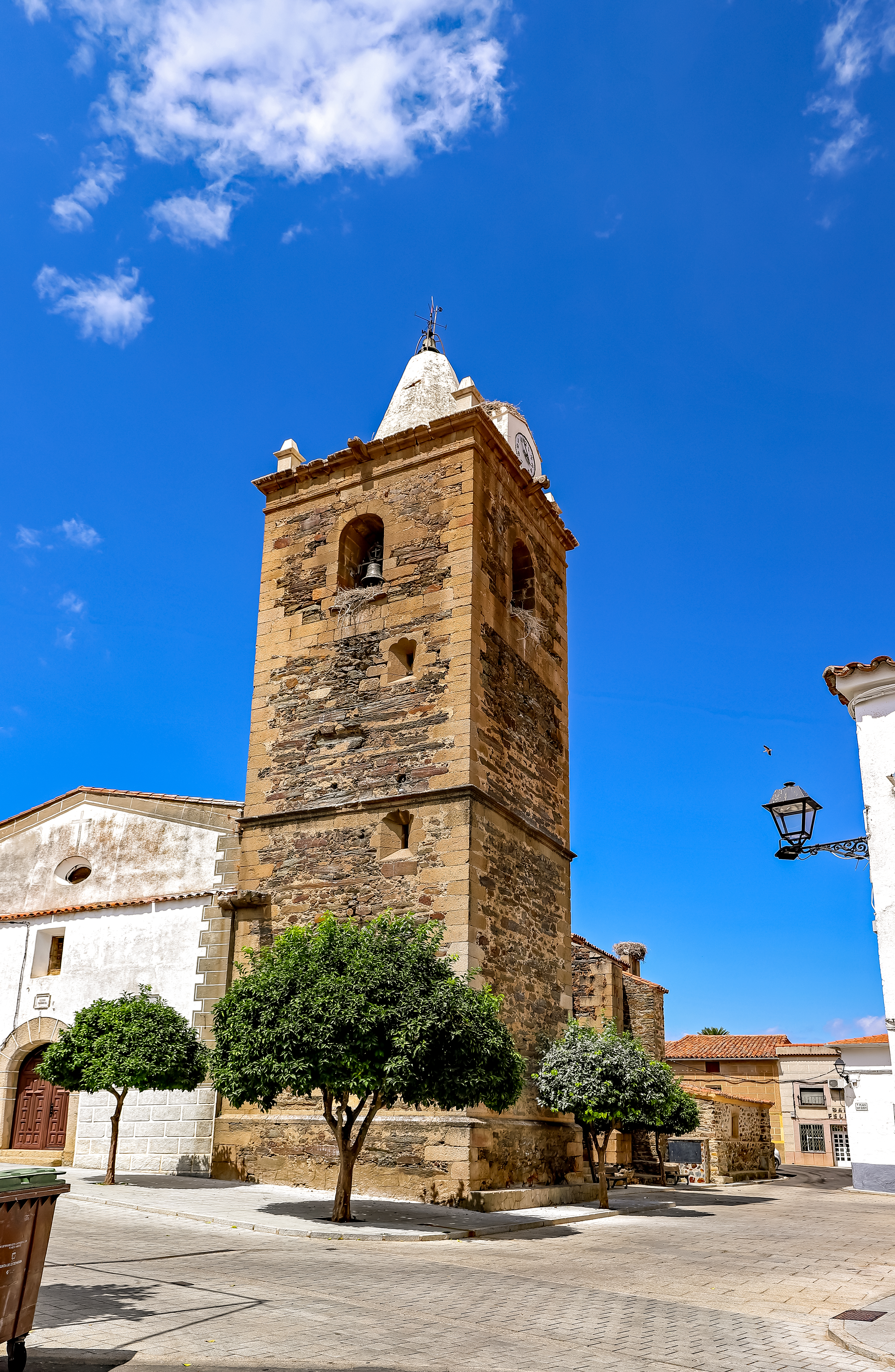 Casillas de Coria es un municipio de la mancomunidad de Rivera de Fresnedosa en la provincia de Cáceres.